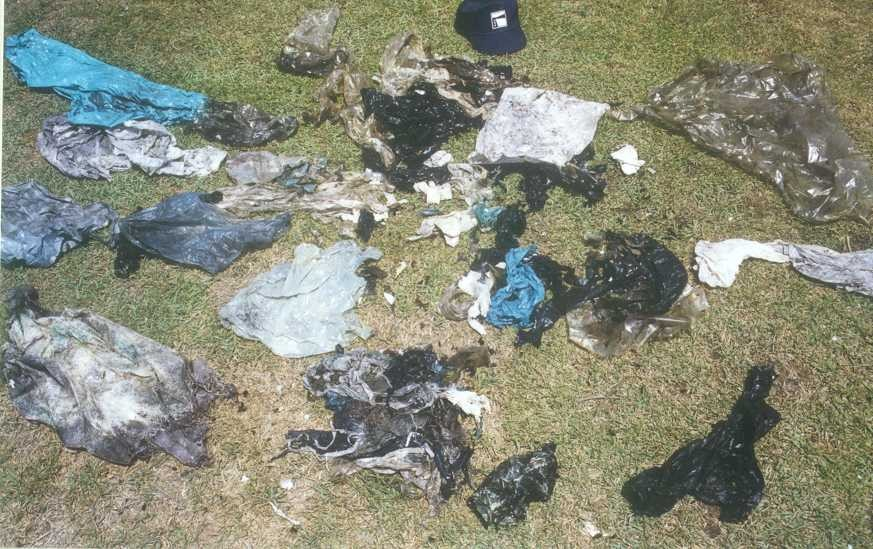 שקיות מקיבתו של זיפיוס חלול-חרטום שהגיע לחופי ישראל